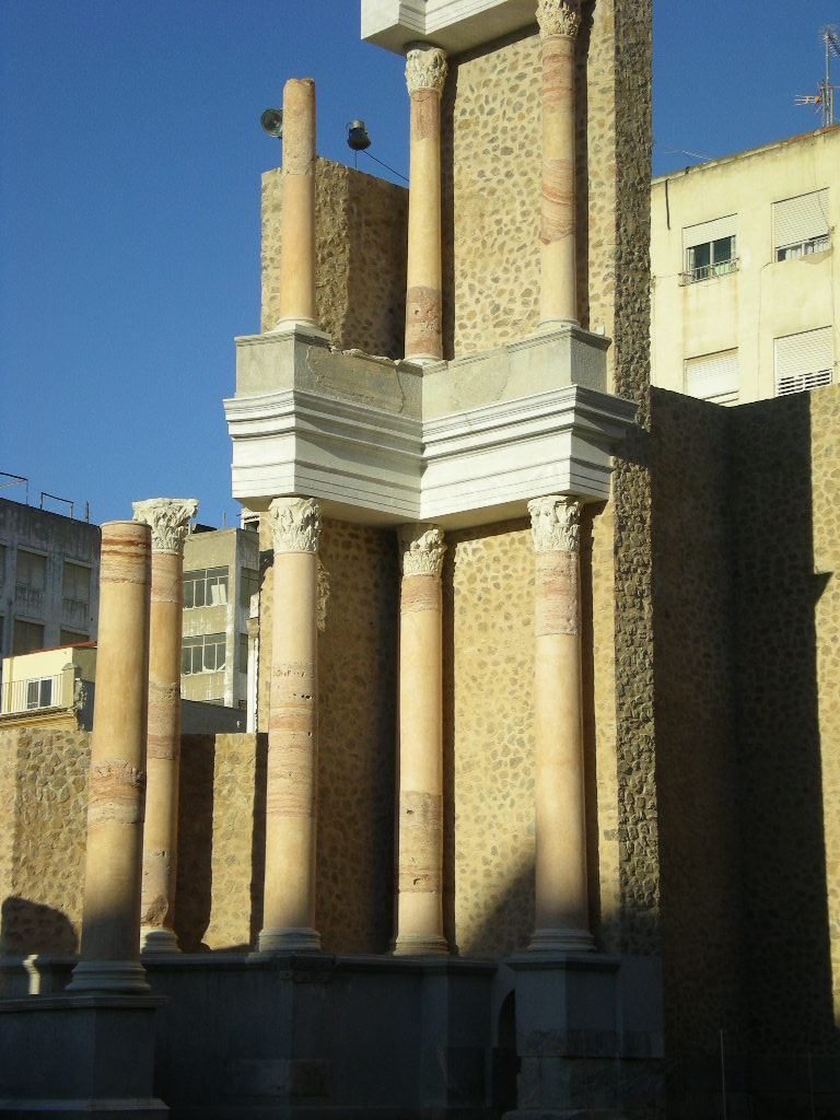 Columnas teatro Romano de Cartagena (Murcia, España)